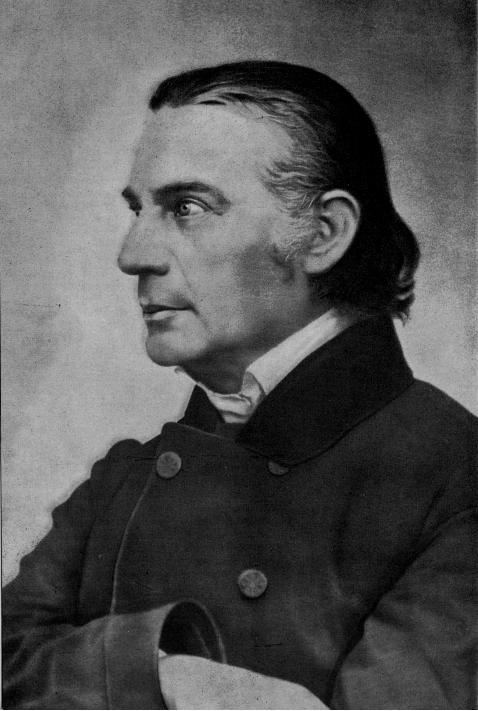 Potrait von Wilhelm Löhe